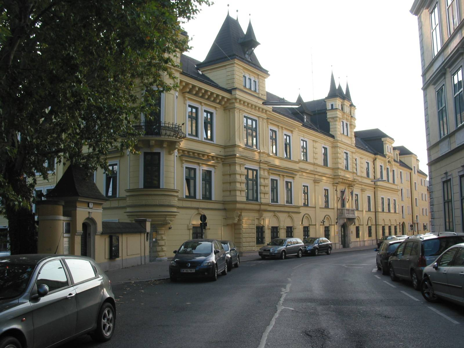 de: Palais Cumberland (Tschechische Botschaft) in Wien en: Palais Cumberland (Czech embassy) in Vienna